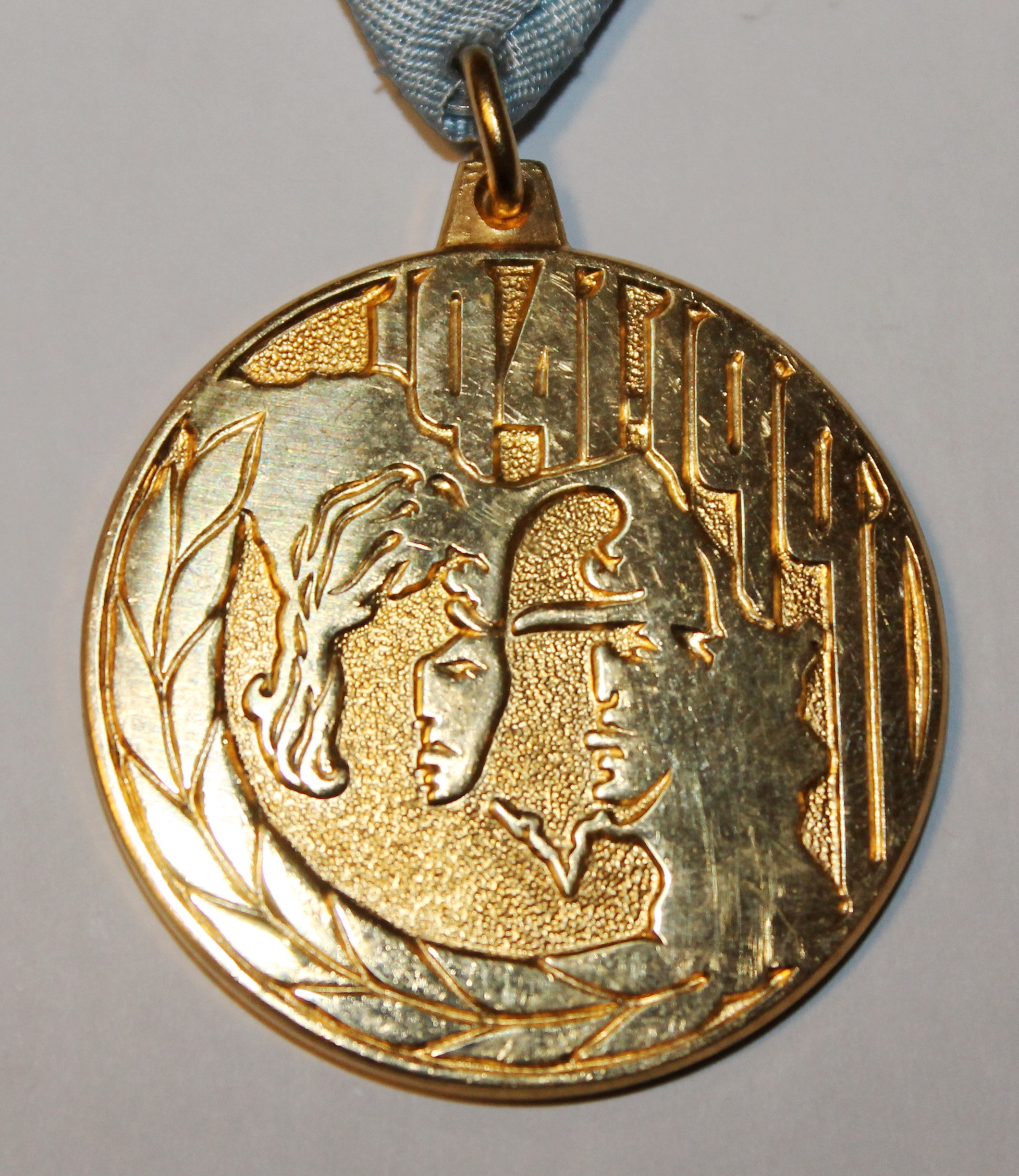 Спомен-медаља поводом педесетогодишњице ЈНА, 1991. година (предњи део)